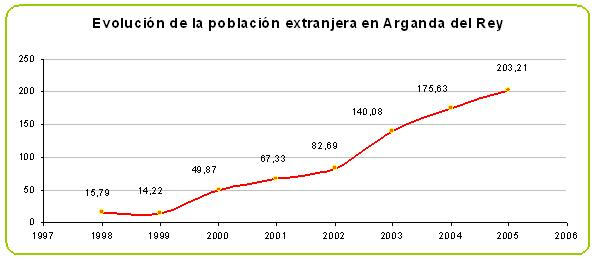 Evolucion de la poblacion extranjera en Arganda del Rey (un municipio de la Comunidad de Madrid), 1998-2005